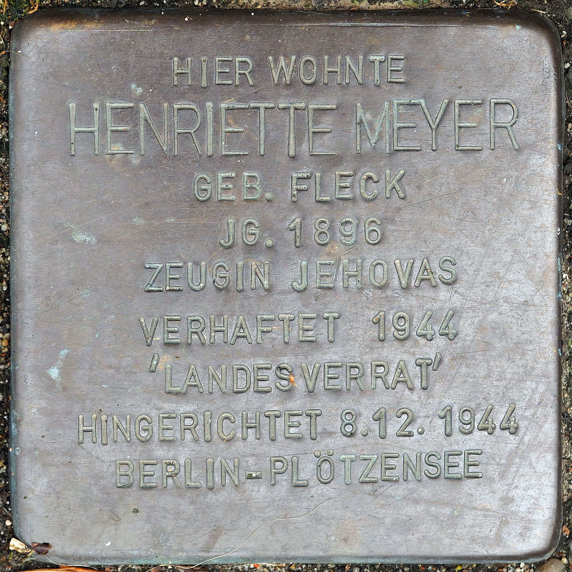 Stolpersteine MG: Meyer, Henriette